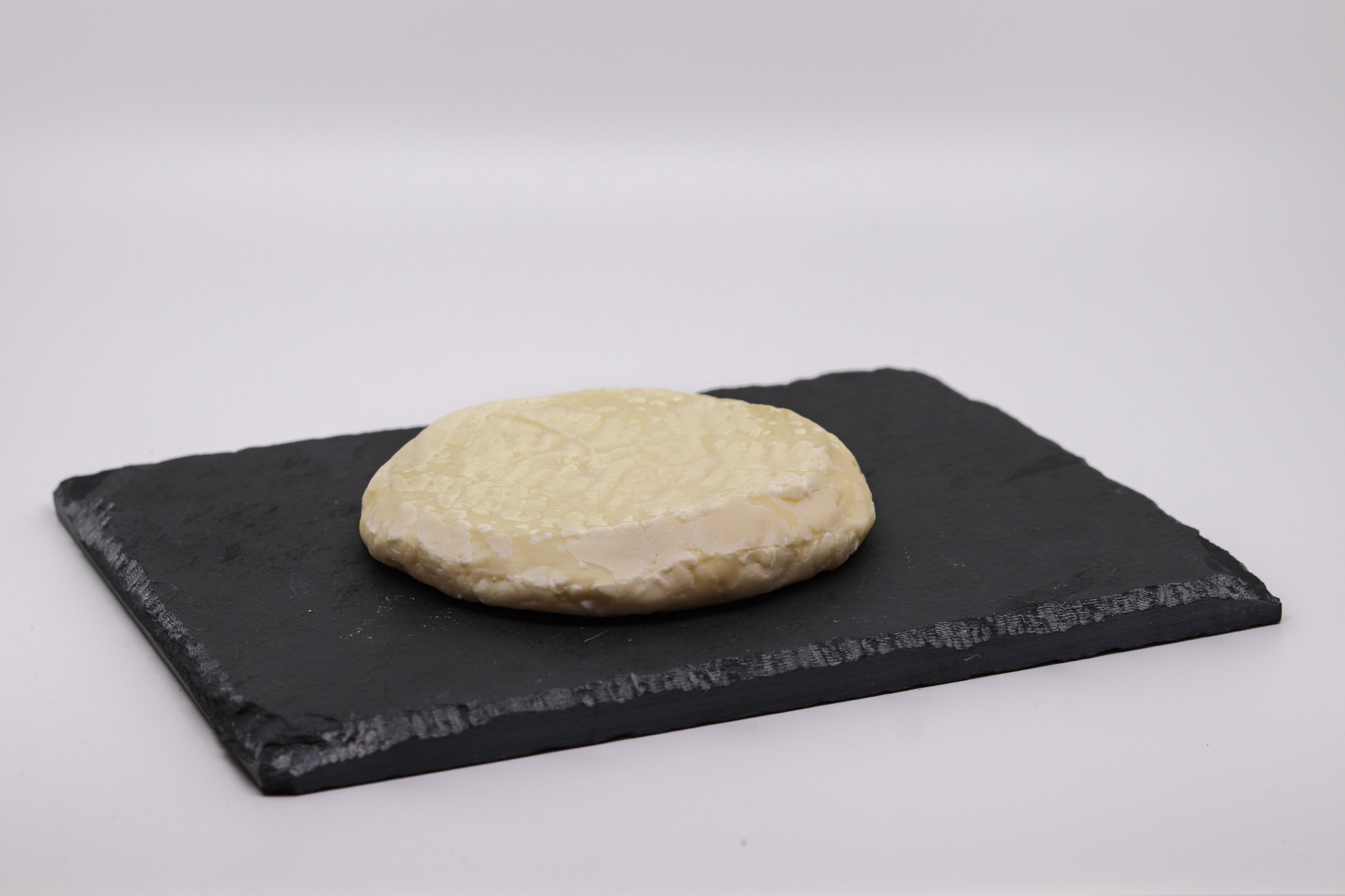 Second atelier Wikifromage. L'atelier a eu lieu à l'édifice de BAnQ Vieux-Montréal.